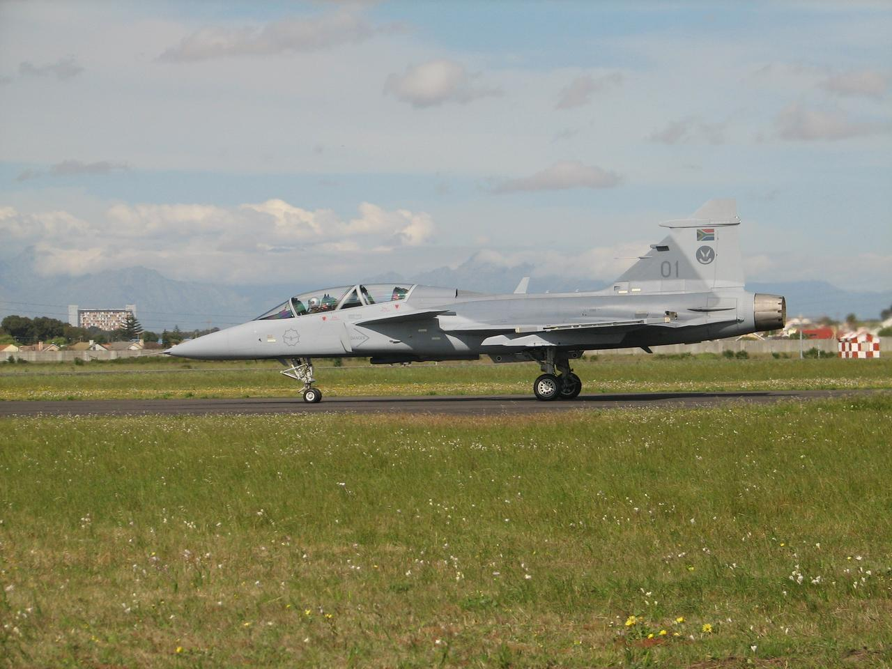 Samolot myśliwski JAS-39-Gripen w barwach SAAF, Ysterplaat, Cape Town, Western CapeAfrikaans: JAS-39-Gripen-vegvliegtuig in SALM-kleure, Ysterplaat LMB, Kaapstad, Wes-Kaap